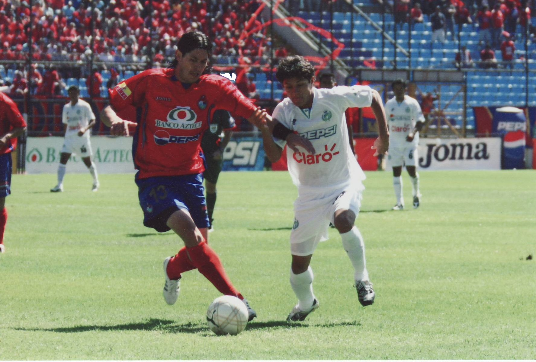 Paulo Centurion (Club Social y Deportivo Municipal) y Jairo Arreola (Comunicaciones FC) ex compañeros ahora rivales disputando el balon en otro clasico Guatemalteco